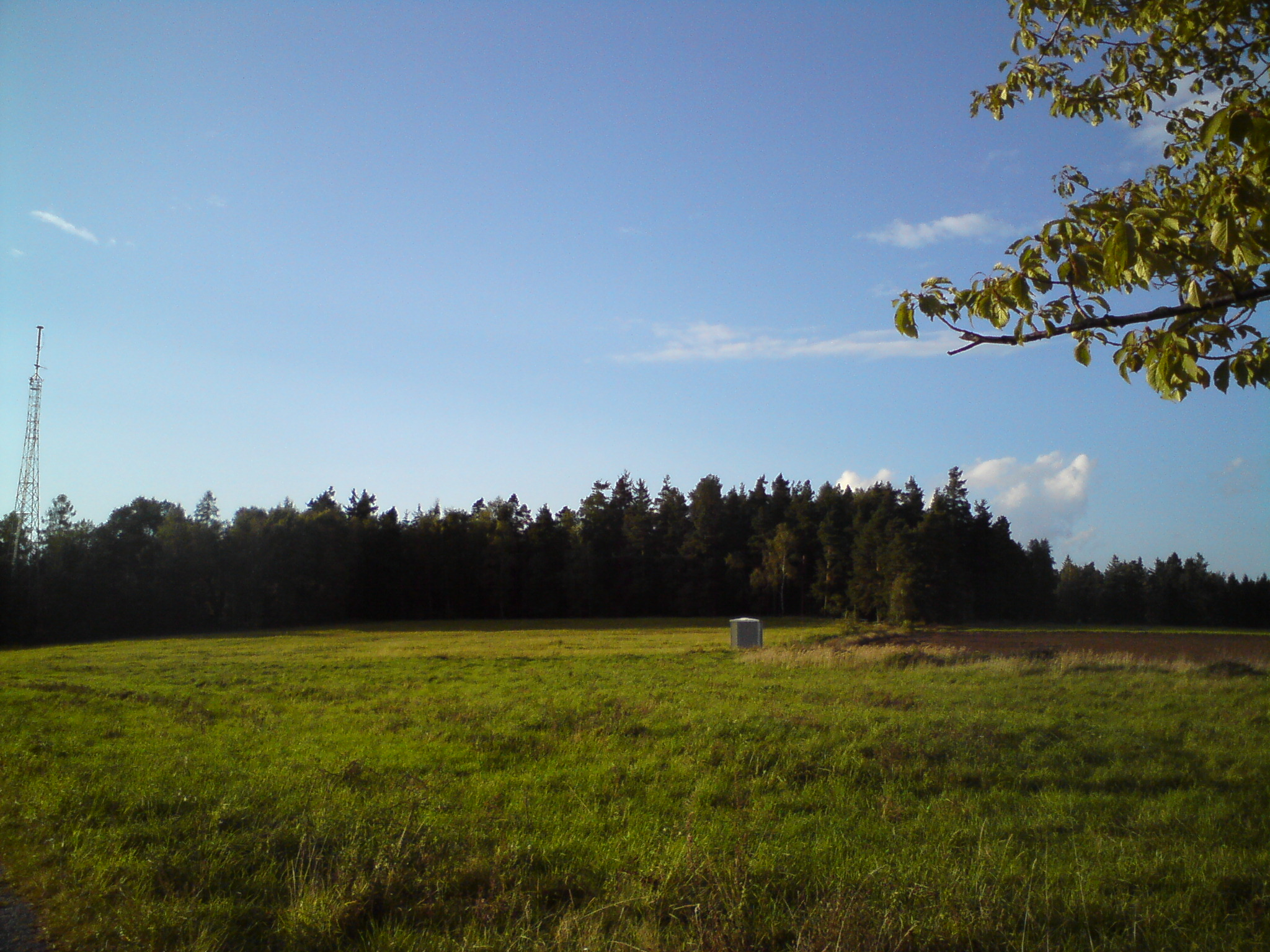 Vrchol Větrník (568 m), ohled od Lišova